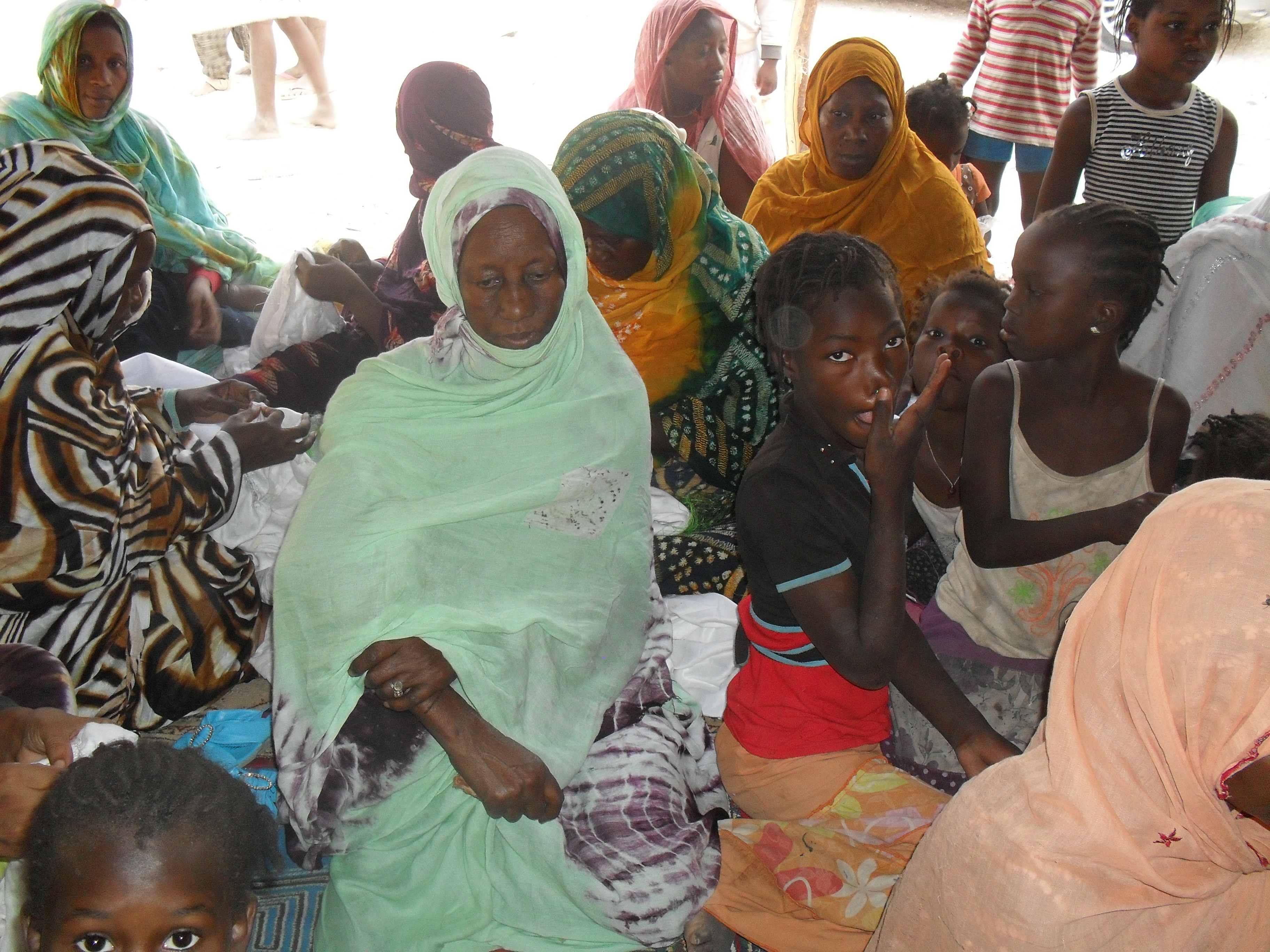 [Jemal Oumar] Awareness campaigns hope to teach families about the child labour crisis. حملات التوعية تأمل توعية الأسر حول أزمة عمل الأطفال Des campagnes d'information ont pour objectif d'expliquer aux familles la problématique du travail des enfants.